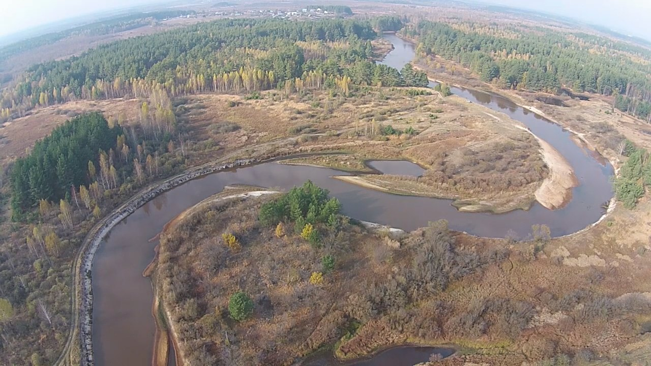 Пра (приток Оки)